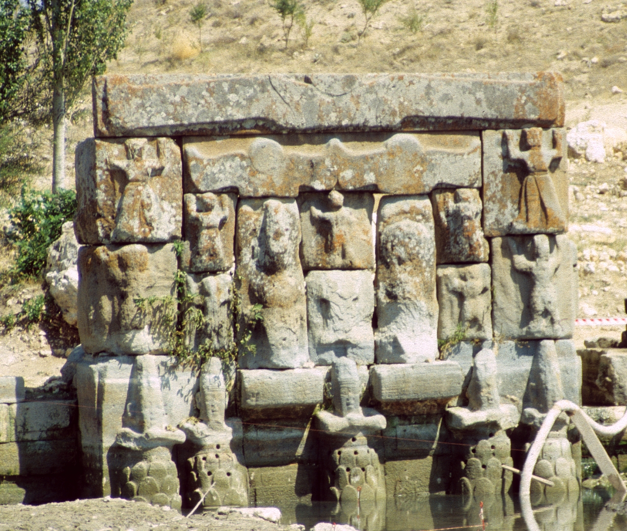 Hethitisches Quellheiligtum Eflatun Pinar beim Beysehir-See, Türkei